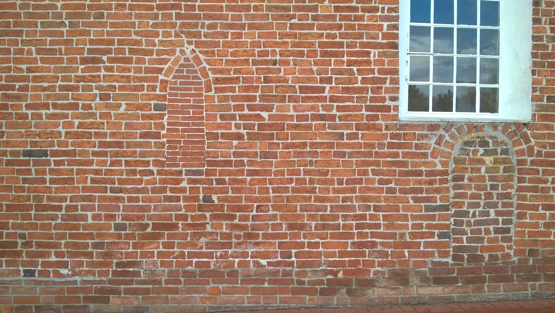 Evangelisch-reformierte Kirche Mitling-Mark, Gemeinde Westoverledingen, Landkreis Leer, Ostfriesland, Niedersachsen, Deutschland